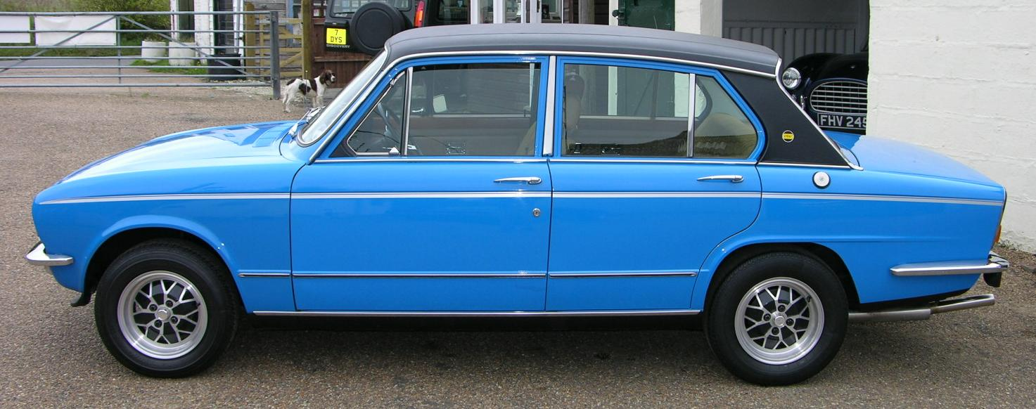 1974 Triumph Dolomite Sprint